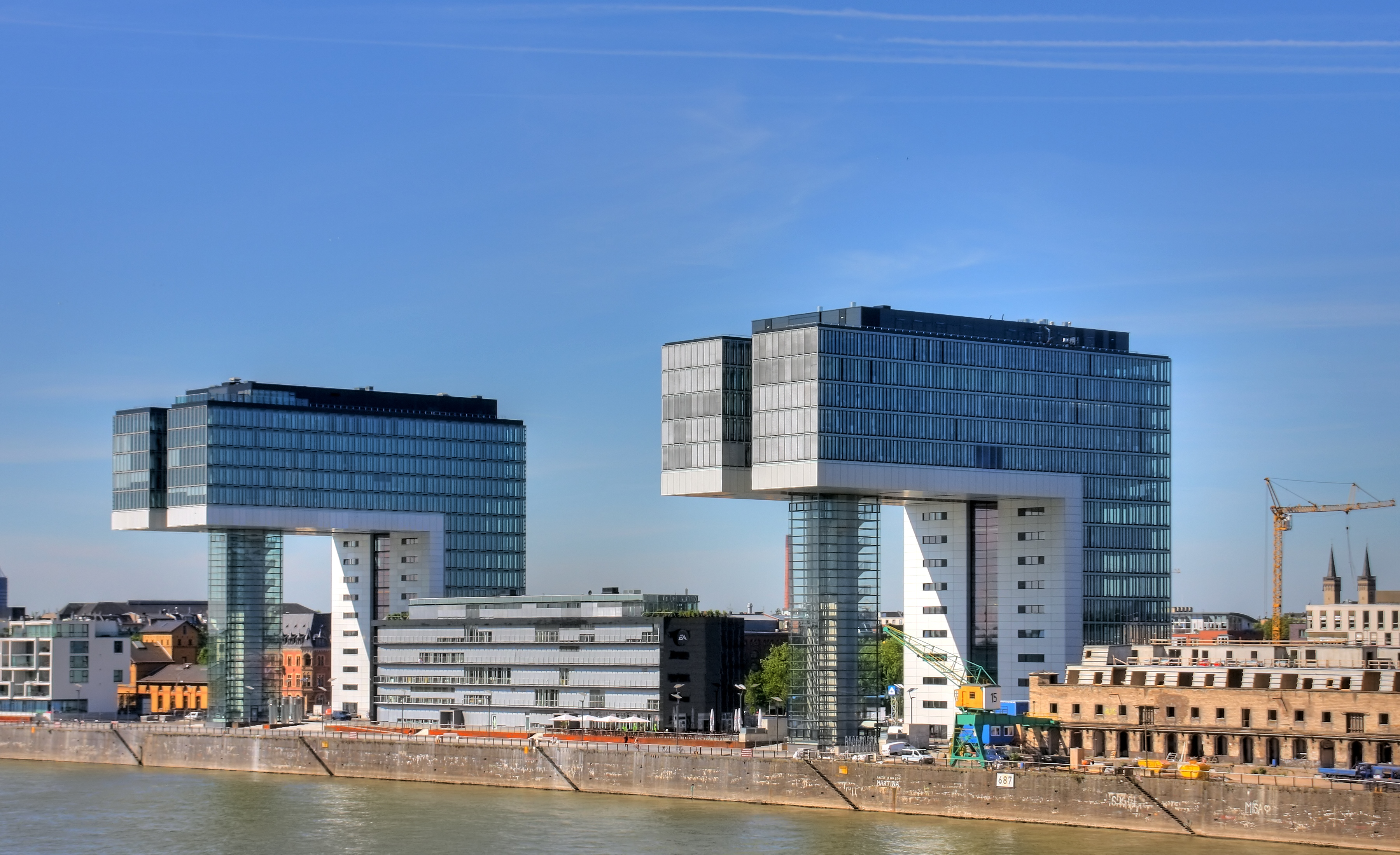 Rheinauhafen Köln. Rheinseite. Von links nach rechts: „KranhausPLUS“, „The Bench“, „Kranhaus1“, Halle 12 (angeschnitten)